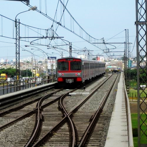 Línea 1 del Metro de Lima.